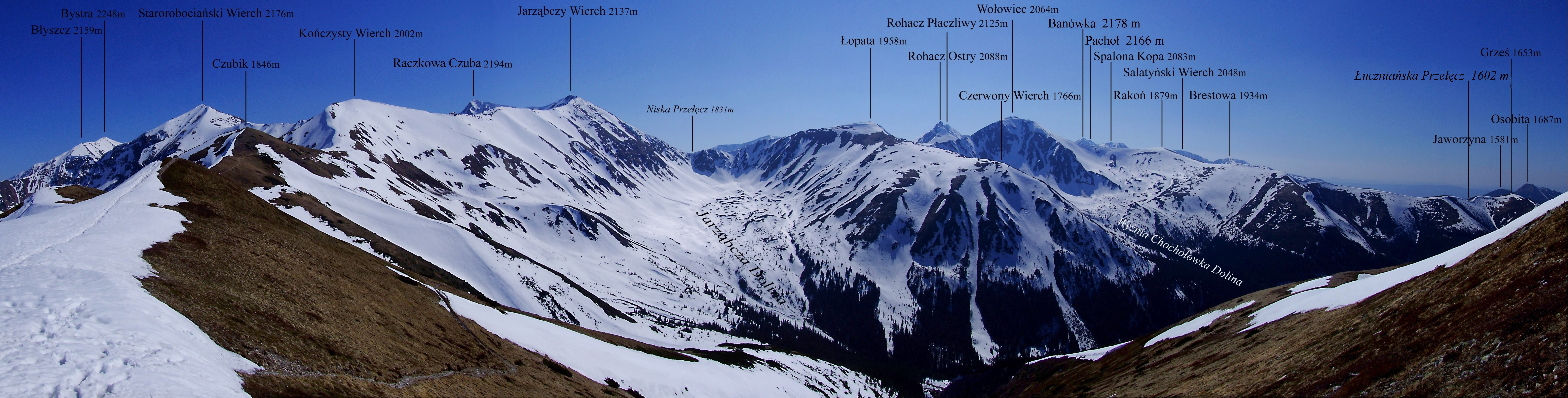 Panorama z Trzydniowiańskiego Wierchu